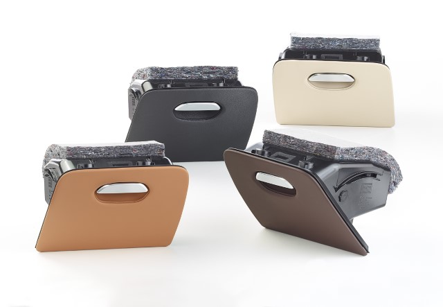 Handschuhfach